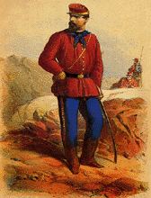 generale Enrico Cosenz, circa 1860.